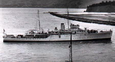 Die englische Sloop Leith